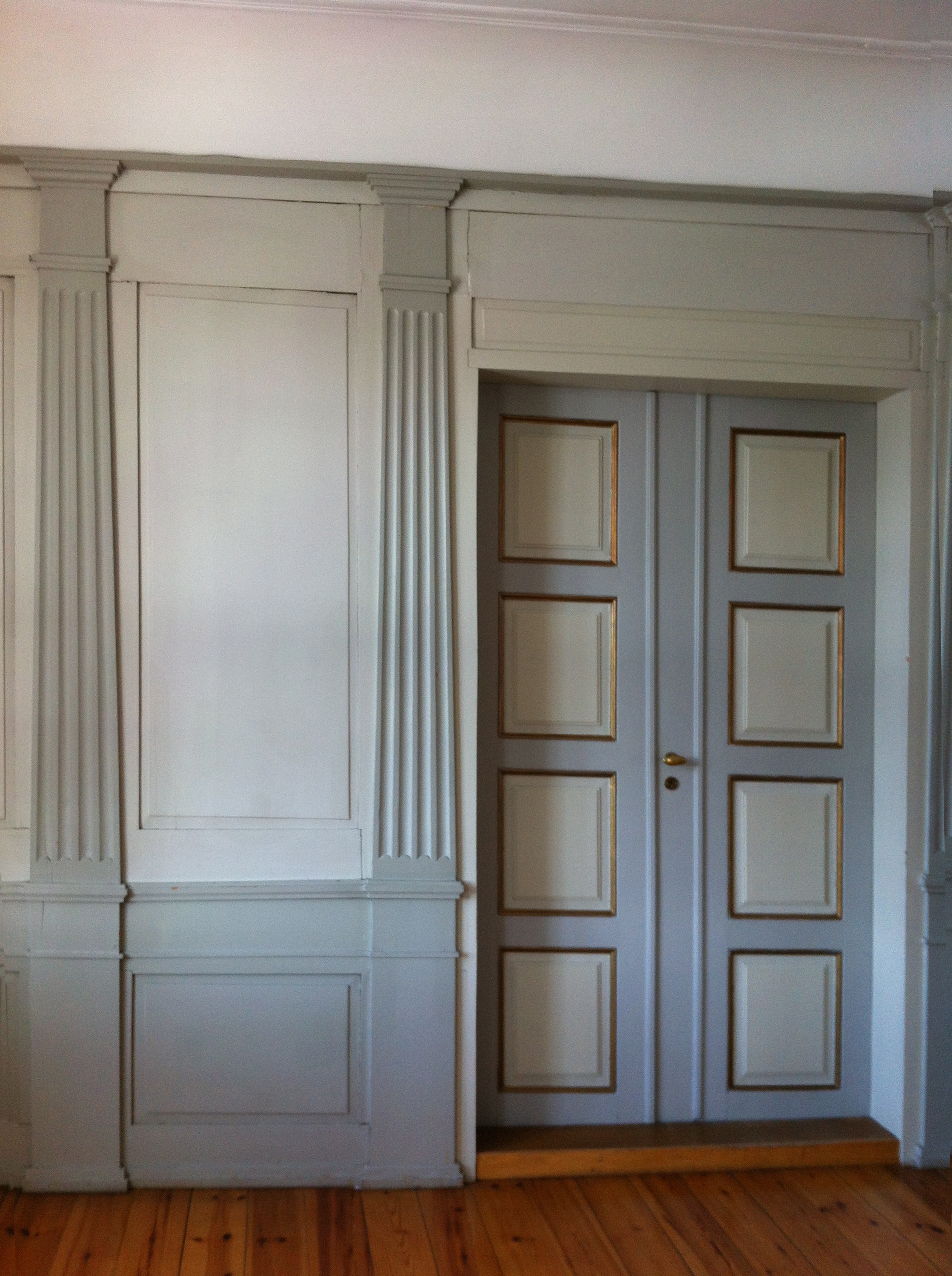 Dør, hallen 2. etasje Lerchendal.